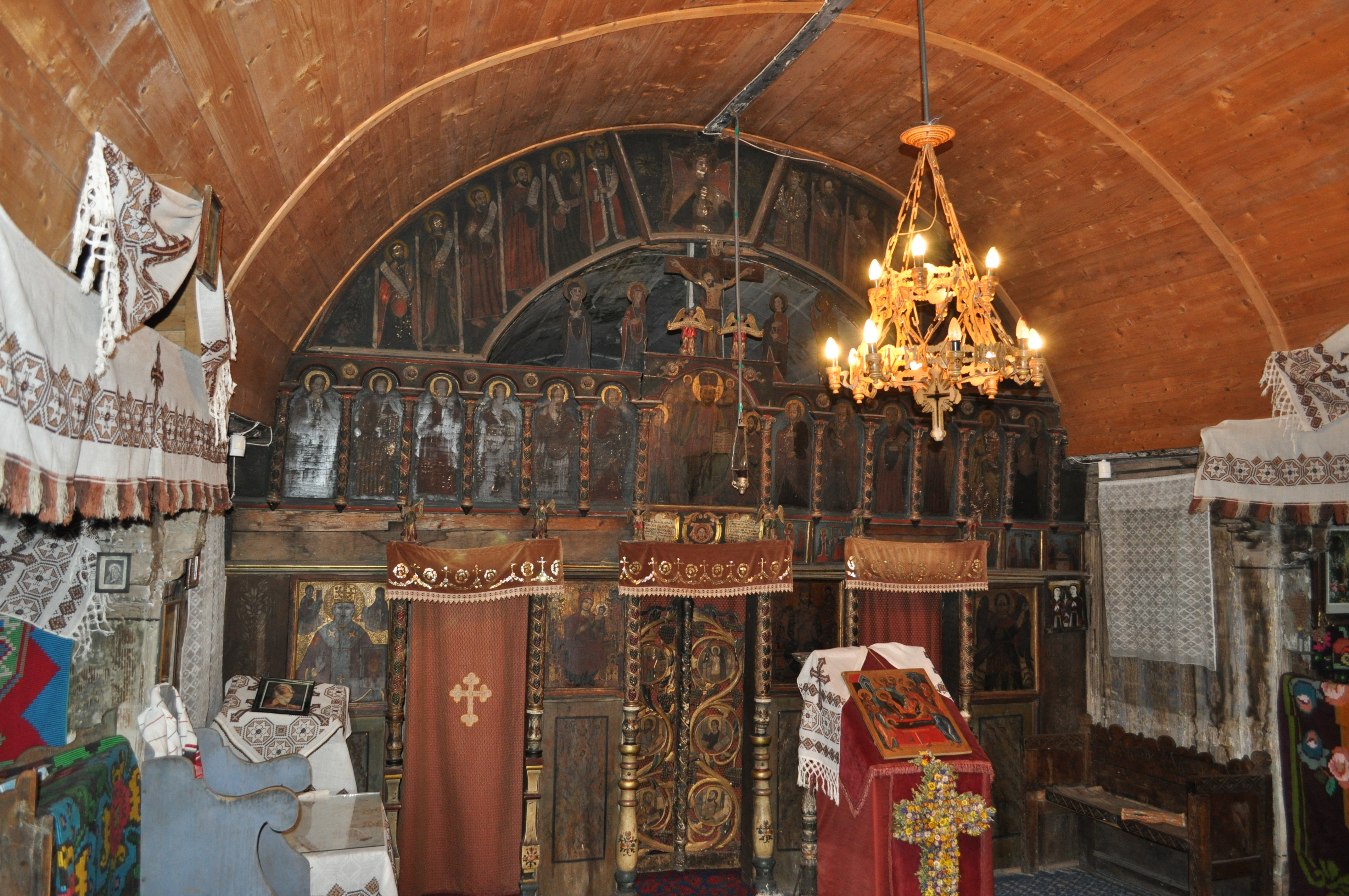 Biserica de lemn „Sfinții Arhangheli” din Reghin, județul Mureș